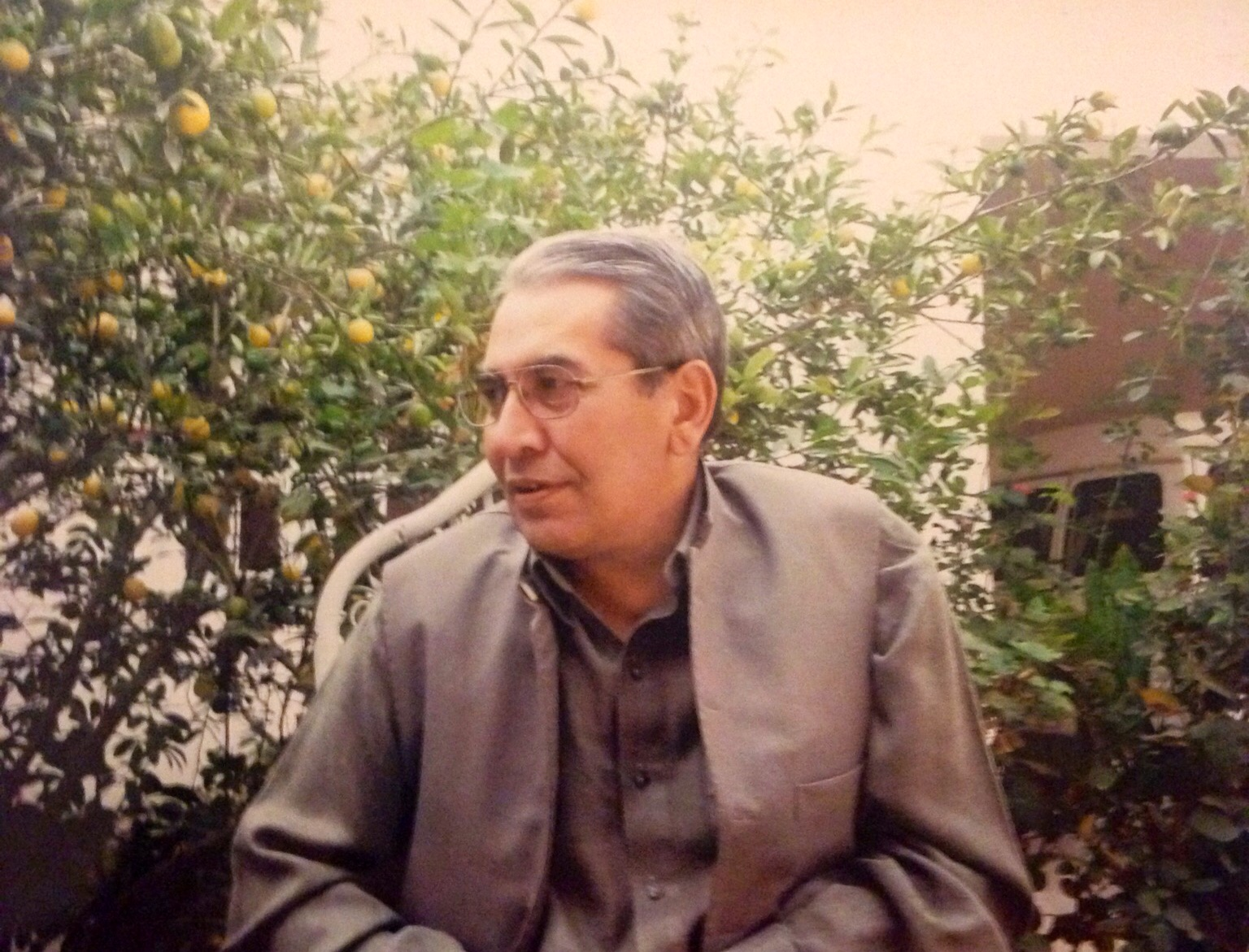 Kabir Stori in his homeland Khas Kunar, Afghanistan.